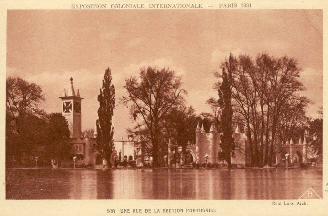 Pavillon du Portugal à l'Exposition Coloniale de PARIS en 1931